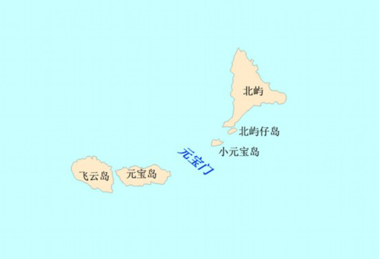 北屿山川河岳地形图